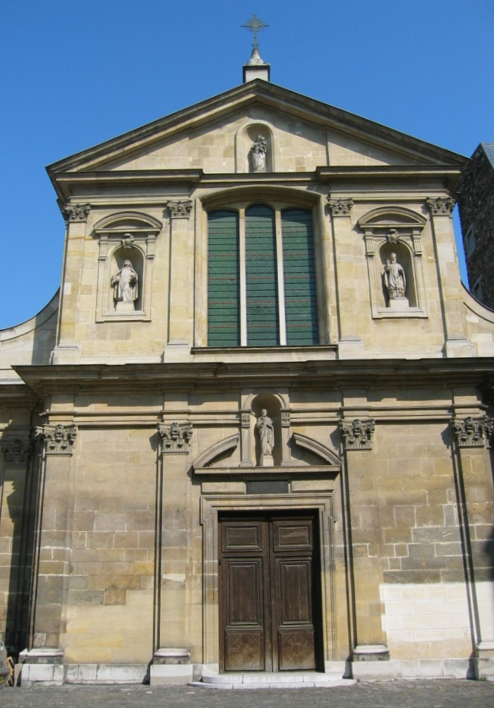 Eglise Saint Joseph-des-Carmes Paris VI